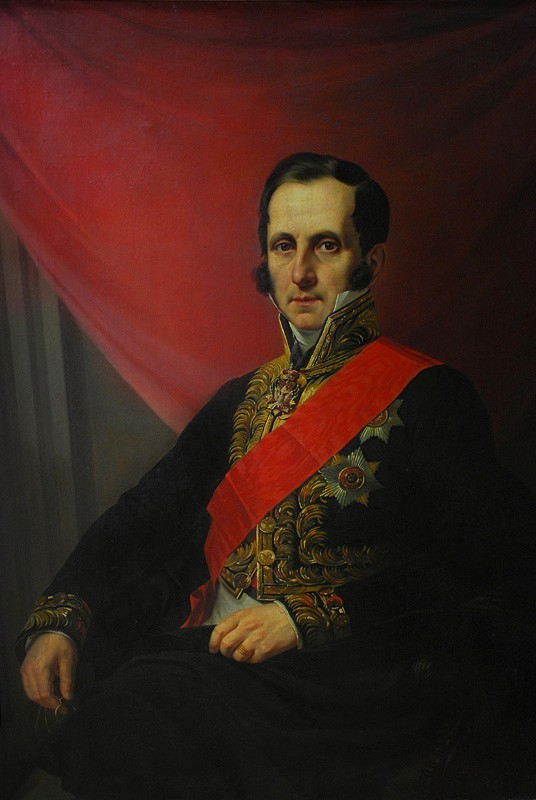 Беларуская (тарашкевіца): Ян Ксавэры Канеўскі. Партрэт графа С. С. Уварава, прэзыдэнта Імпэратарскай акадэміі навук. Палатно, алей. 116x90